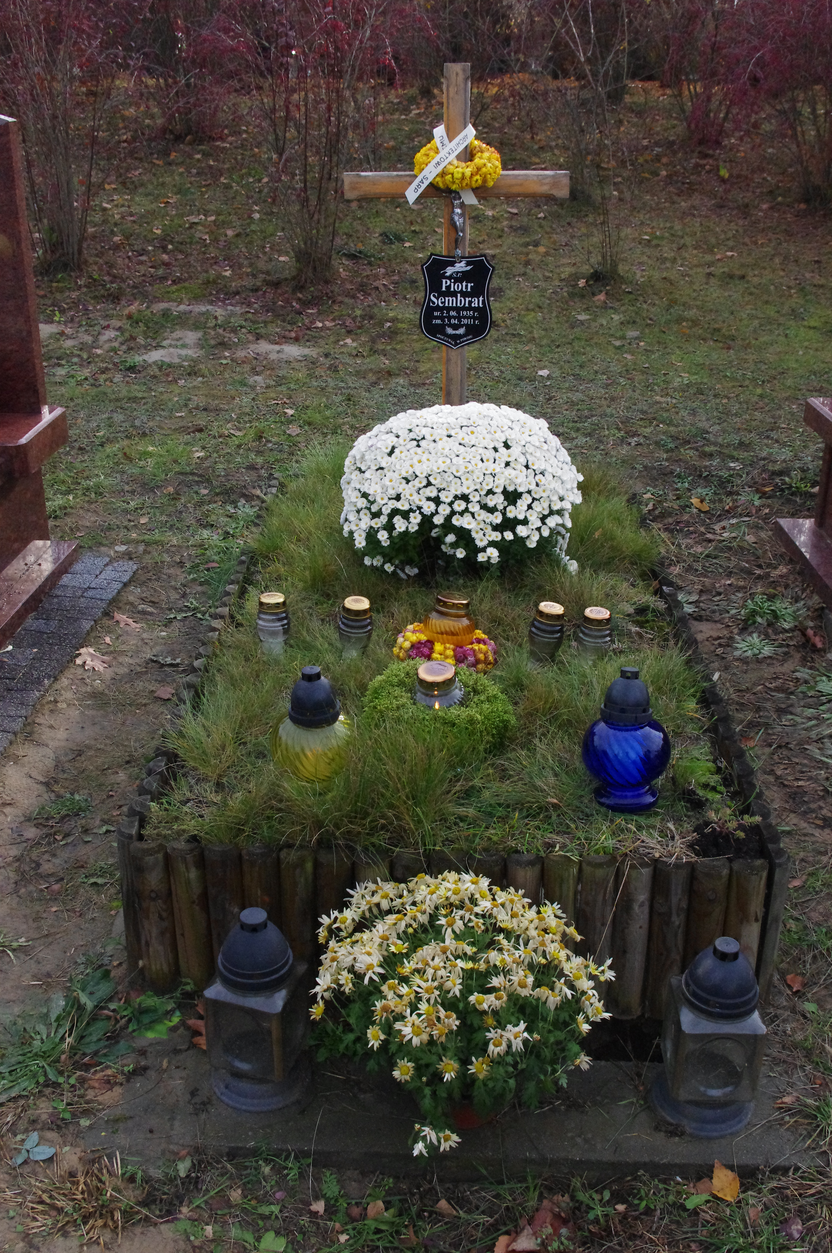 Grób architekta Piotra Sembrata na Cmentarzu Komunalnym Północnym w Warszawie